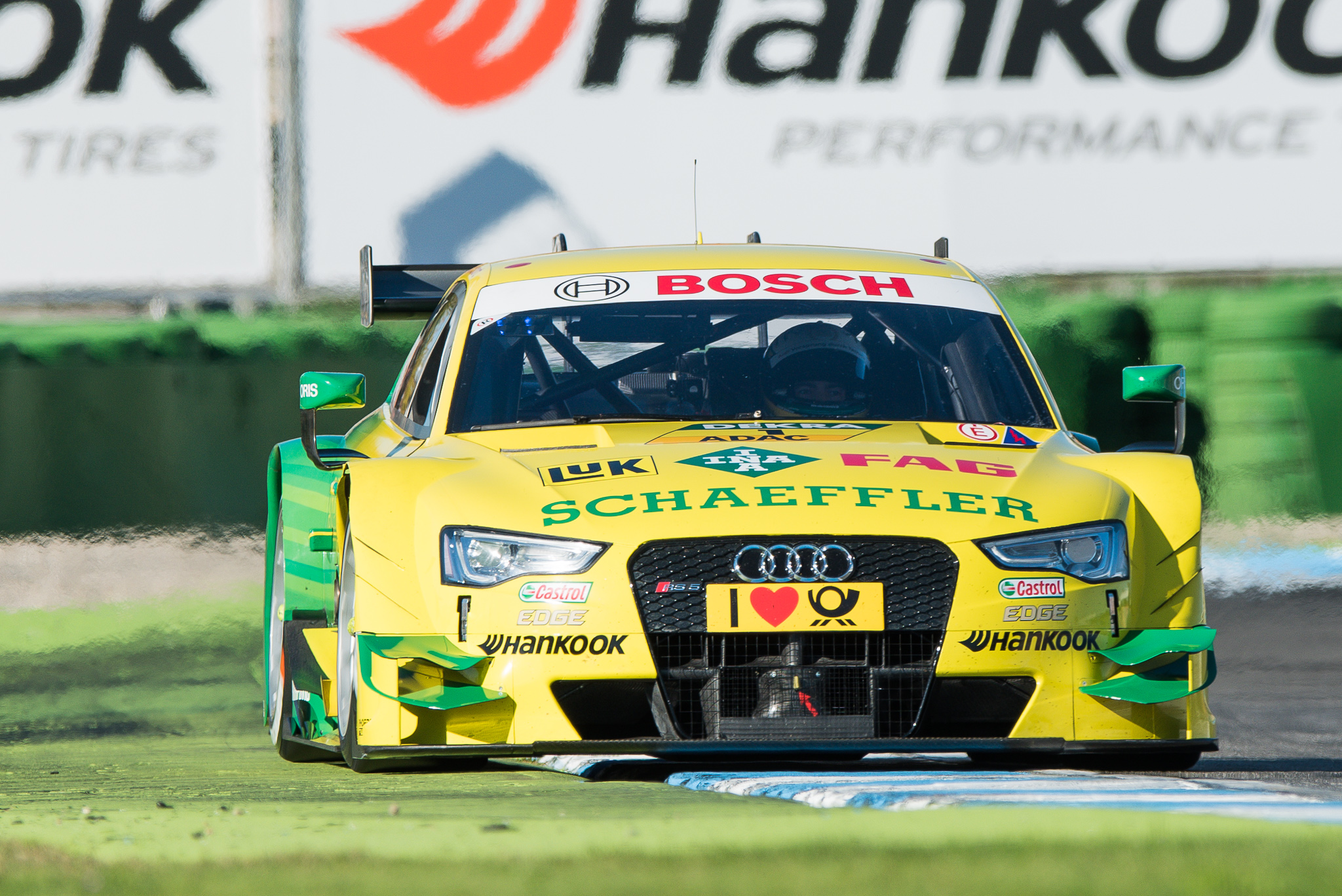 DTM,Deutsche Tourenwagen Masters,Hockenheimring,Mike Rockenfeller,Motorsport,Phoenix Racing GmbH,Schaeffler Audi RS 5 DTM